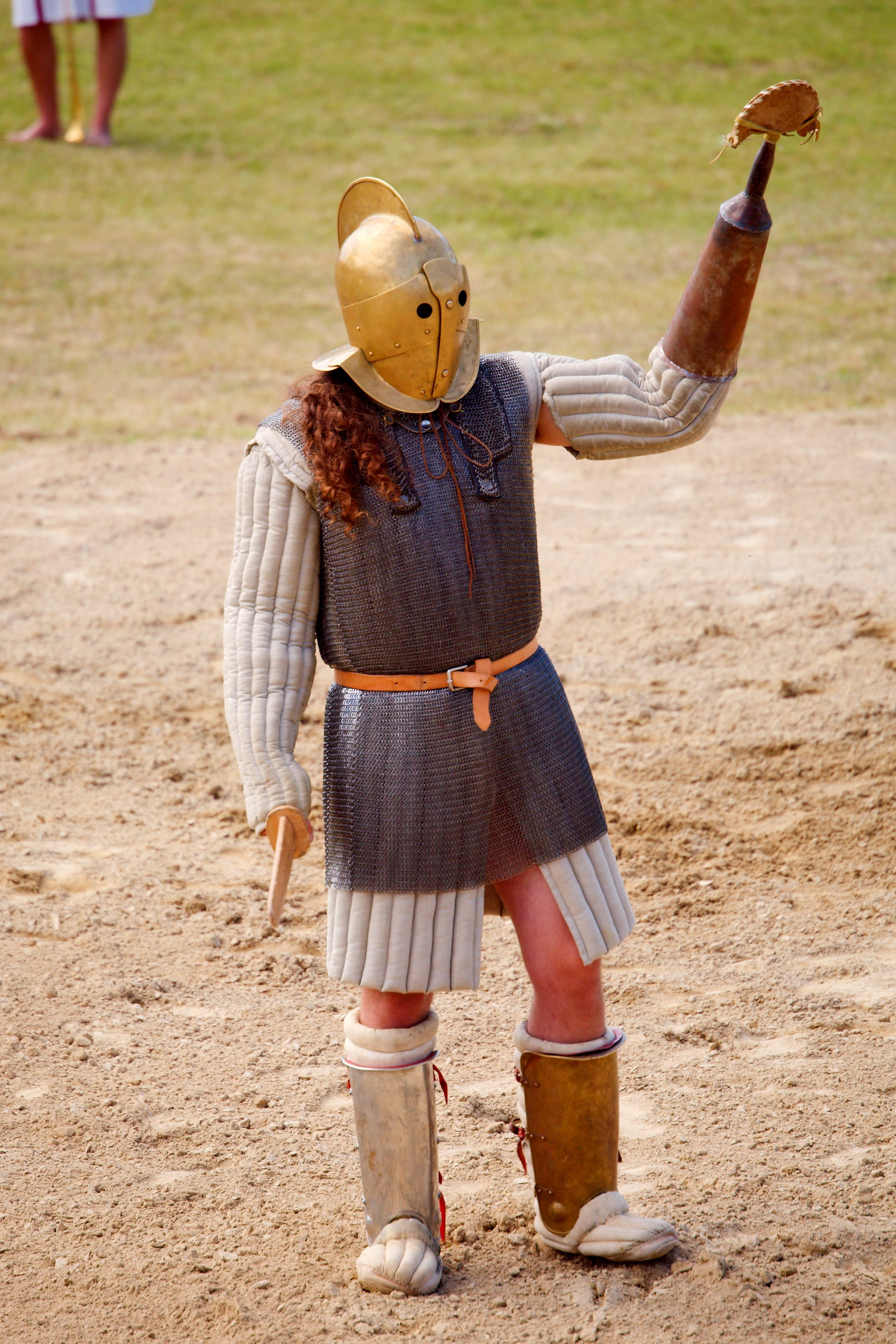 Vorführung in Carnuntum